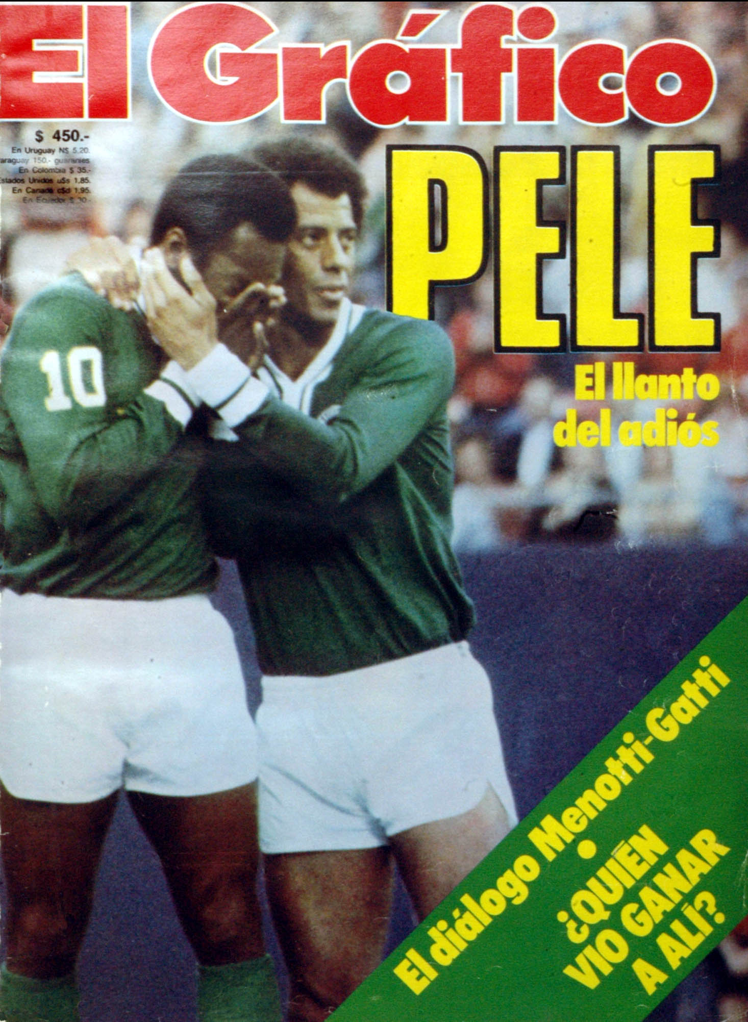 Pelé crying while teammate Carlos Alberto consoles him, at the end of his speech during Pelé's farewell match.